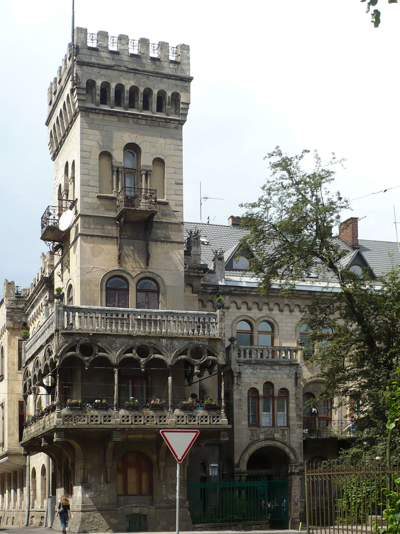 Lwów, ul. Generała Czuprynki 50/52 - dawny dom Biesiadeckiego, 1901